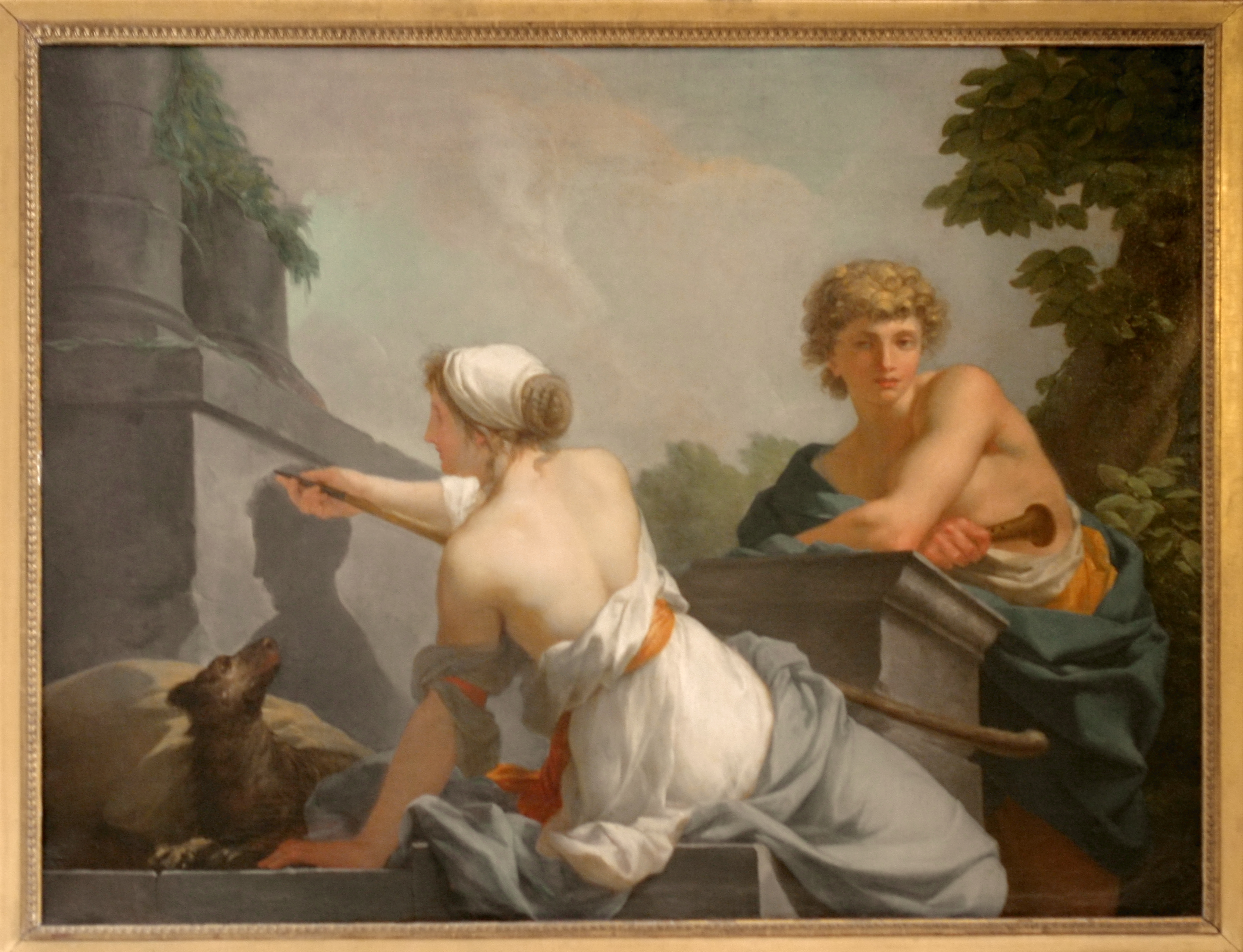 La jeune corinthienne Callirrhoé dessinant le profil du berger son amant